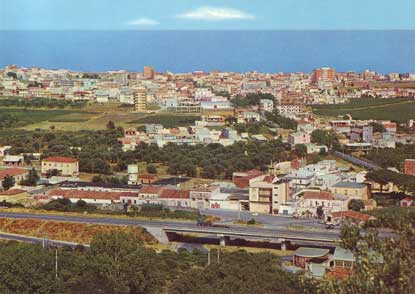 Immagine di Cirò Marina (KR) in una foto degli anni novanta. L'immagine è PD-Italia perché si tratta di una foto scattata oltre 20 anni fa.